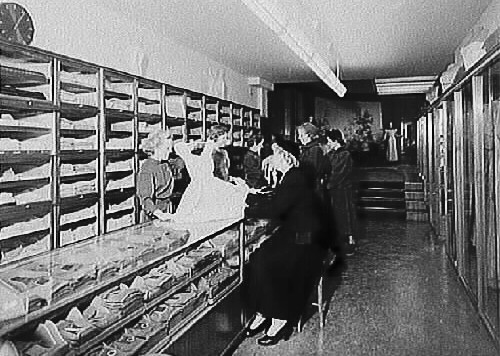 Twilfit interiör 1952